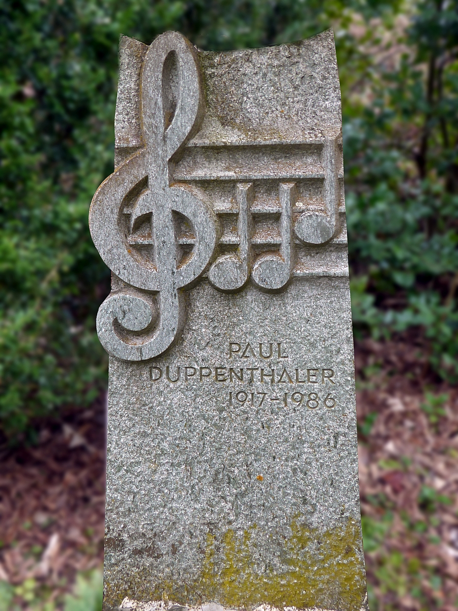 Paul Duppenthaler (1917–1986) Musiker, Dirigent, Jodler, Ausgezeichnet mit dem "Goldenen Violinschlüssel" Grabstein vor dem Friedhofmuseum, Friedhof Hörnli, Riehen, Basel-Stadt